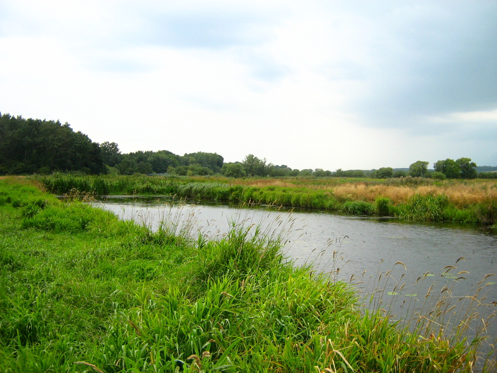 Die Recknitz bei Dudendorf (Gemeinde Dettmannsdorf, Landkreis Vorpommern-Rügen), unterhalb des „Recknitzberges“ auf der Südseite (Gemeinde Grammow, Landkreis Rostock, Mecklenburg). Bereich im FFH-Gebiet DE-1941-301 „Recknitz- und Trebeltal mit Zuflüssen“.